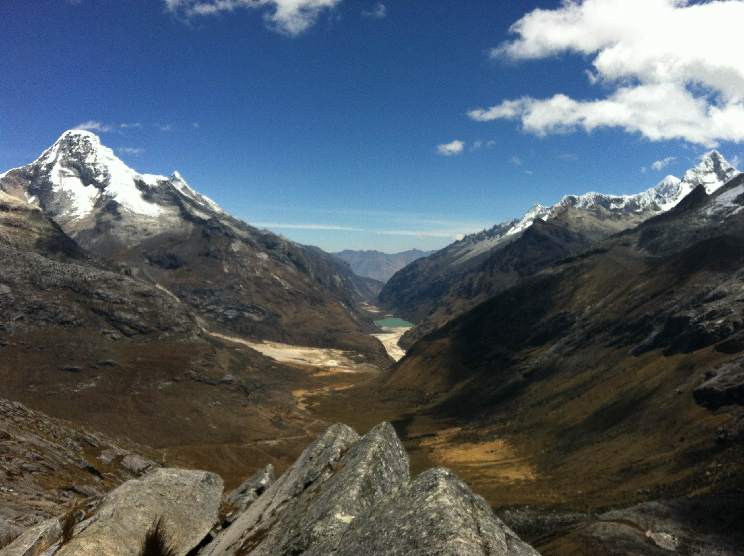 Close to Glacier of Nevado Taulliraju Peak near Punta Union, Santa Cruz Track, Cordillera Blanca, Peru